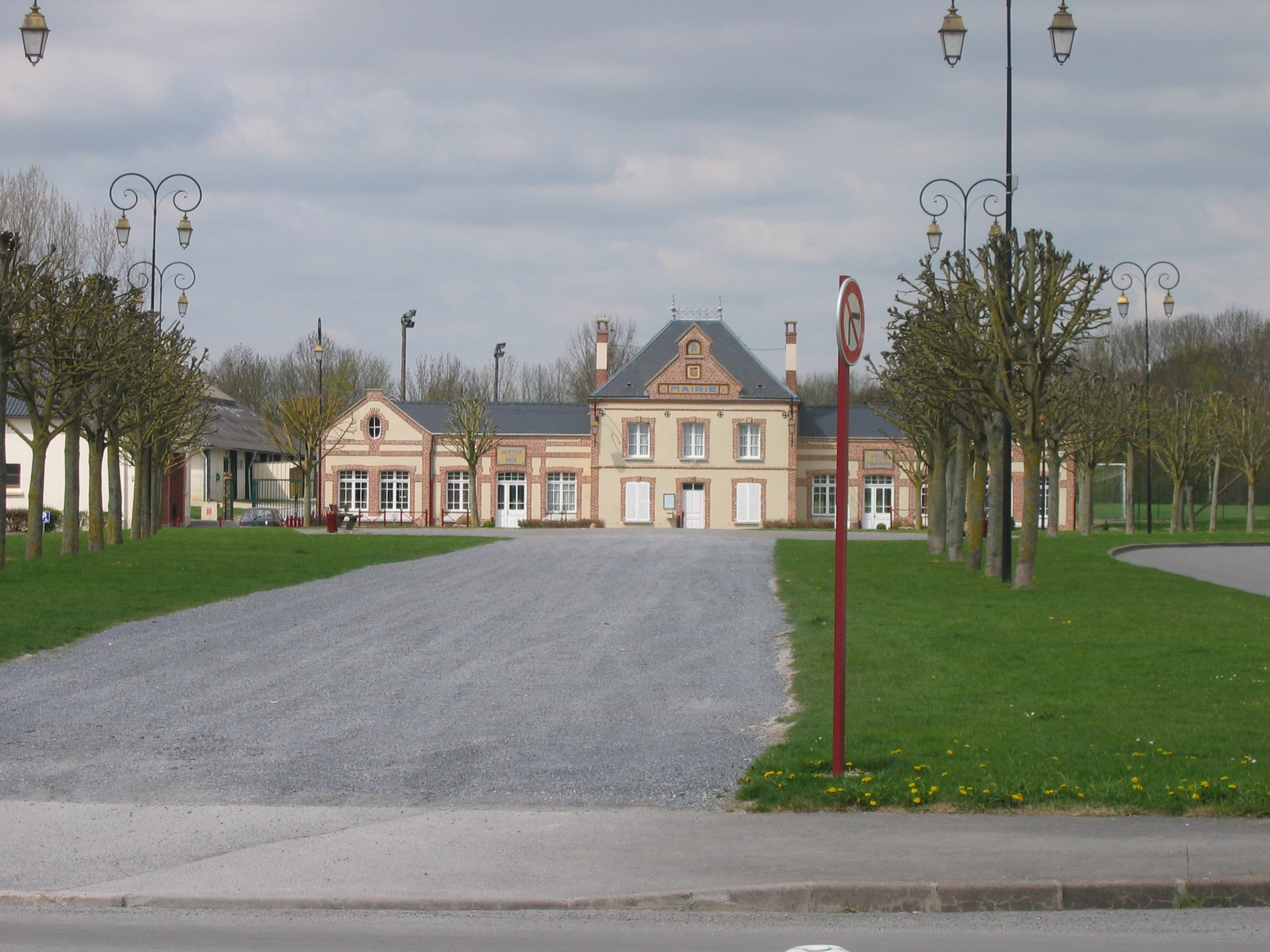 Mairie et place d'Asfeld Ardennes France